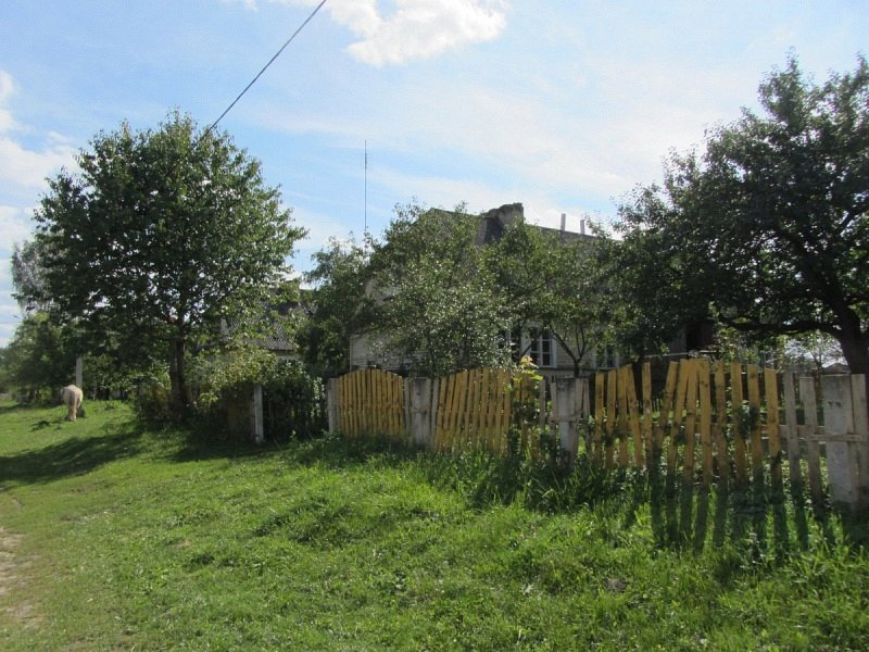 Бердаўка. Дом асаднікаў